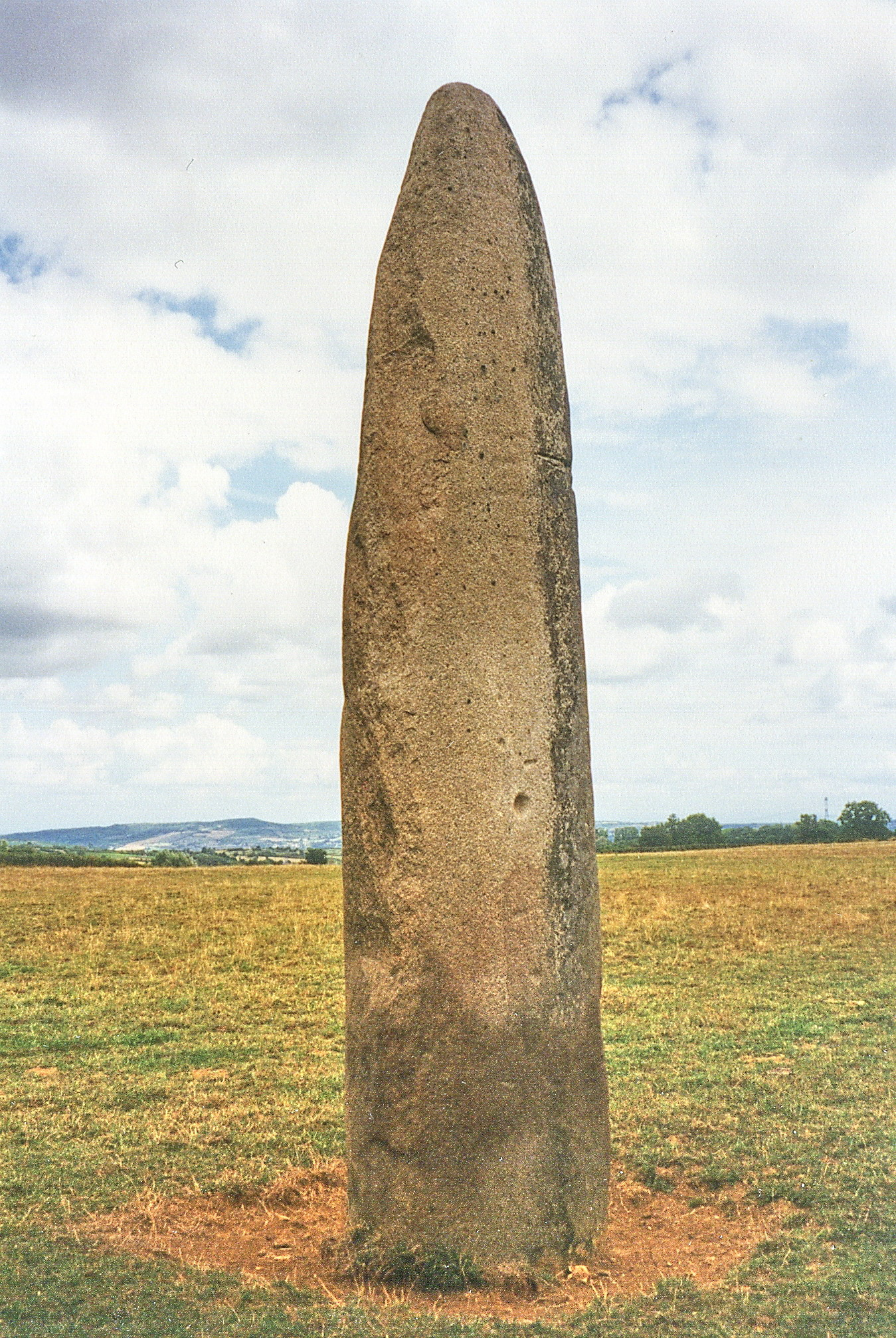 Bourgogne, Couches, Menhirs d'Epoigny